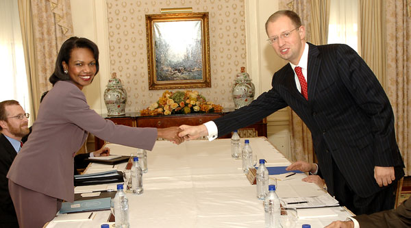 Condoleezza Rice and Arseniy Yatsenyuk.